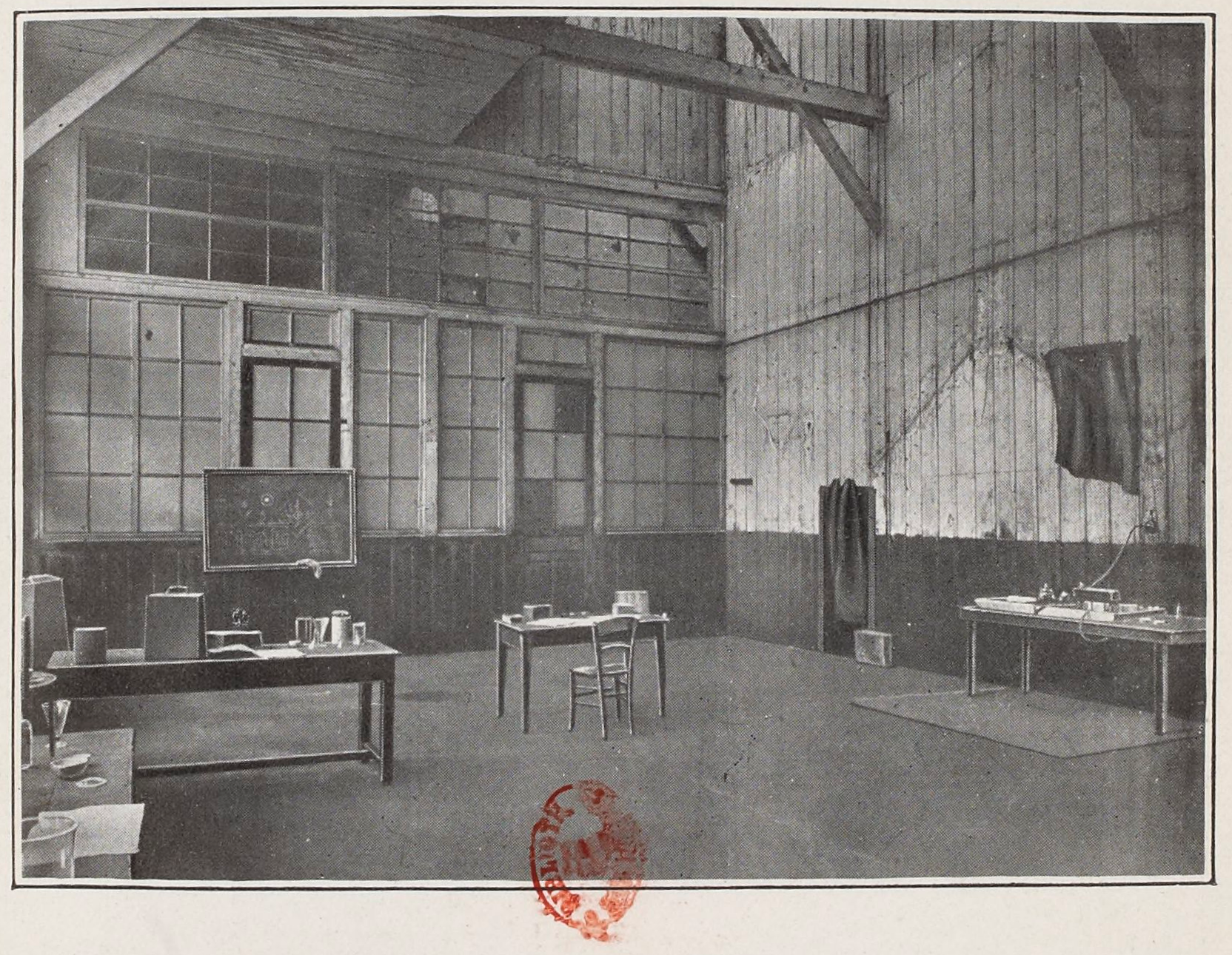 Pièce dans laquelle étaient effectués les traitements chimiques du minerai et la concentration du radium. Vue II